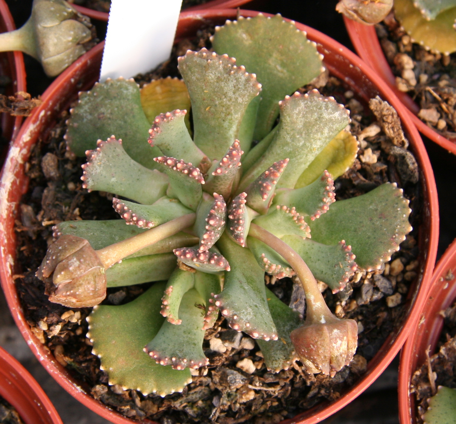 Aloinopsis malherbei in Kultur bei Kakteen-Haage in Erfurt